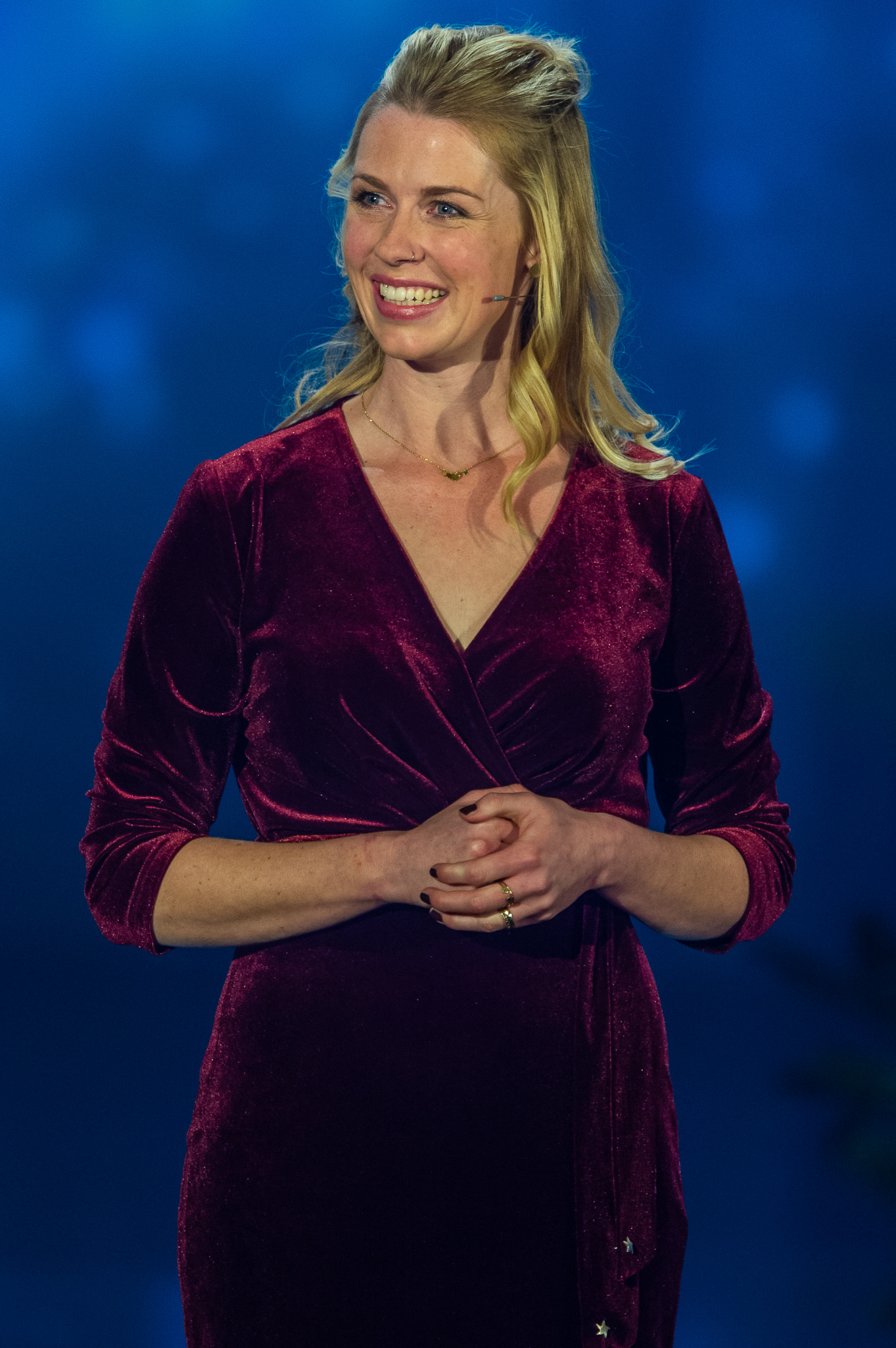 BR,Bayerisches Fernsehen,Christine Eixenberger,Frankenhalle,Live-Sendung,Sternstunden-Gala,Sternstundengala